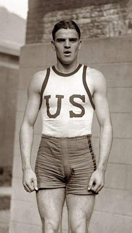 Bob Le Grende [Legendre], Georgetown, 1919